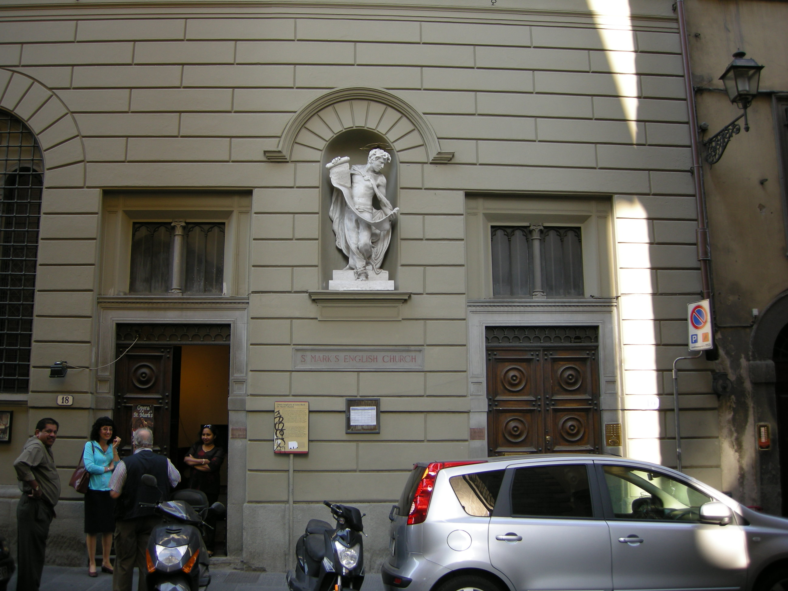 Chiesa di st mark, esterno